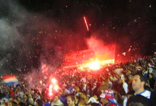 La Banda del Parque Central o simplemente La Banda Del Parquee, es la barra de aliento del Club Nacional de Football de Montevideo. El nombre se deriva del estadio de Nacional, el Gran Parque Central. Se destaca también por el esfuerzo que ha realizado la directiva del Club que, en acuerdo con los referentes de la banda, ha erradicado los elementos violentos que caracterizan a estos grupos en sudamerica.